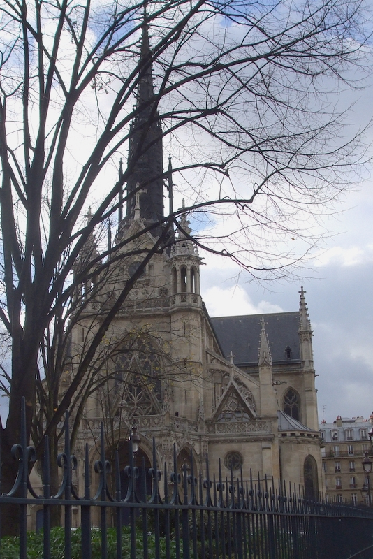 Église Saint Bernard vue depuis la rue Saint Mathieu/ Stephenson